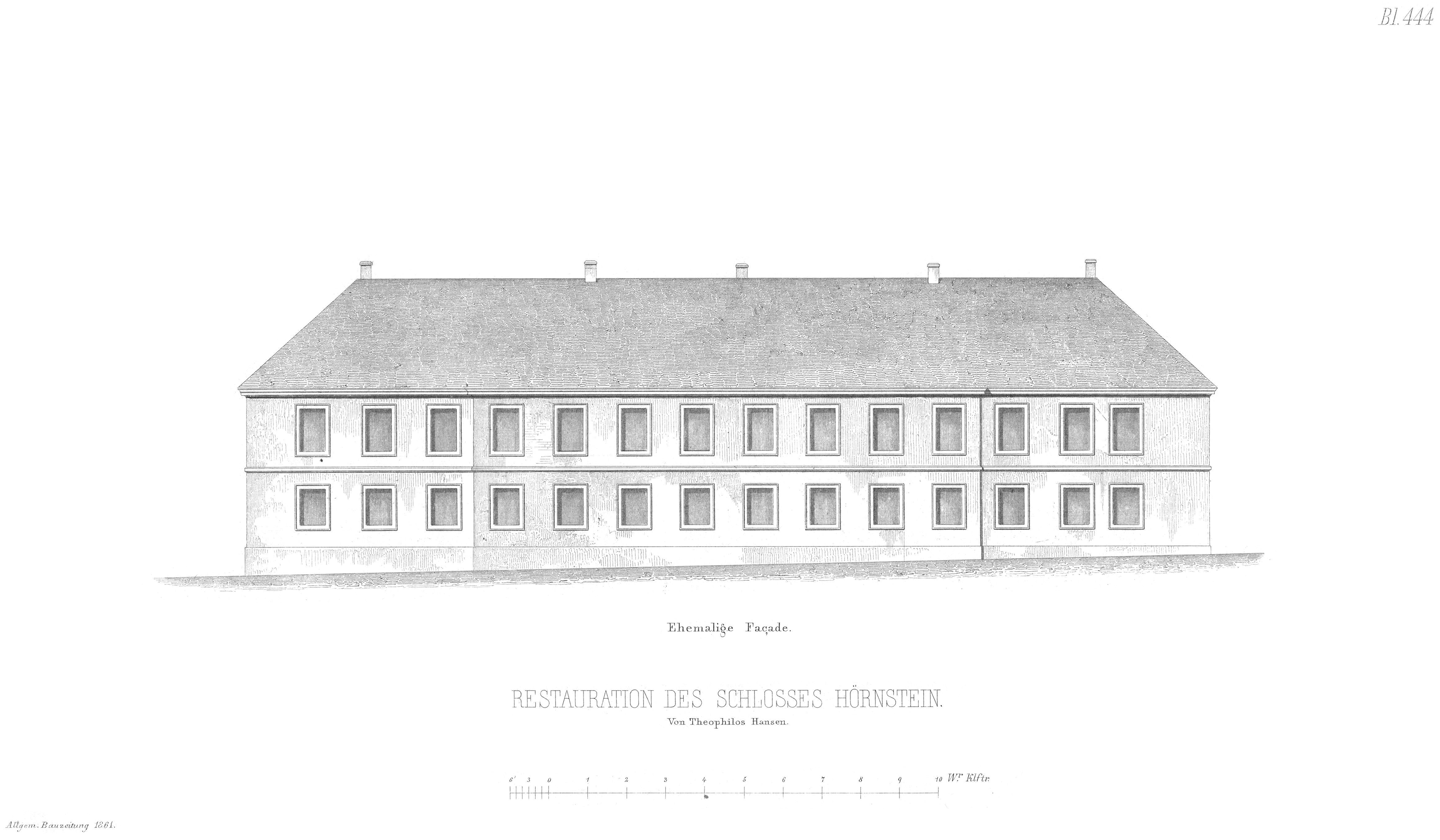 Pläne von Theophil Hansen für die Renovierung des Schlosses Hernstein (auf den Plänen Hörnstein) veröffentlicht in der Allgemeinen Bauzeitung, 1861. Der Umbau erfolgte von 1855-1880, die Pläne müssen also vor 1861 entstanden sein. Aufriss des Vorgängerbaus.